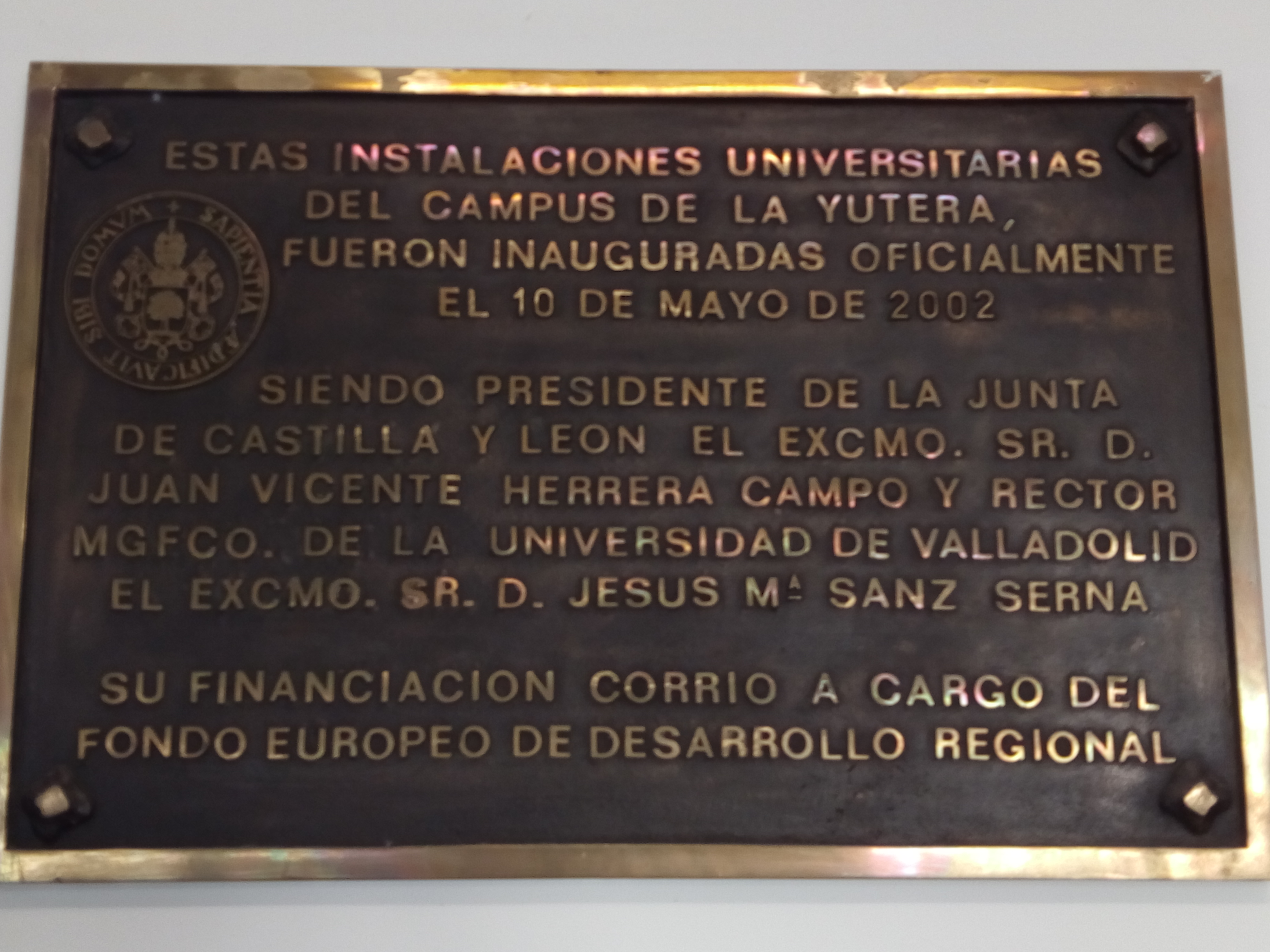 Placa de la Universidad.